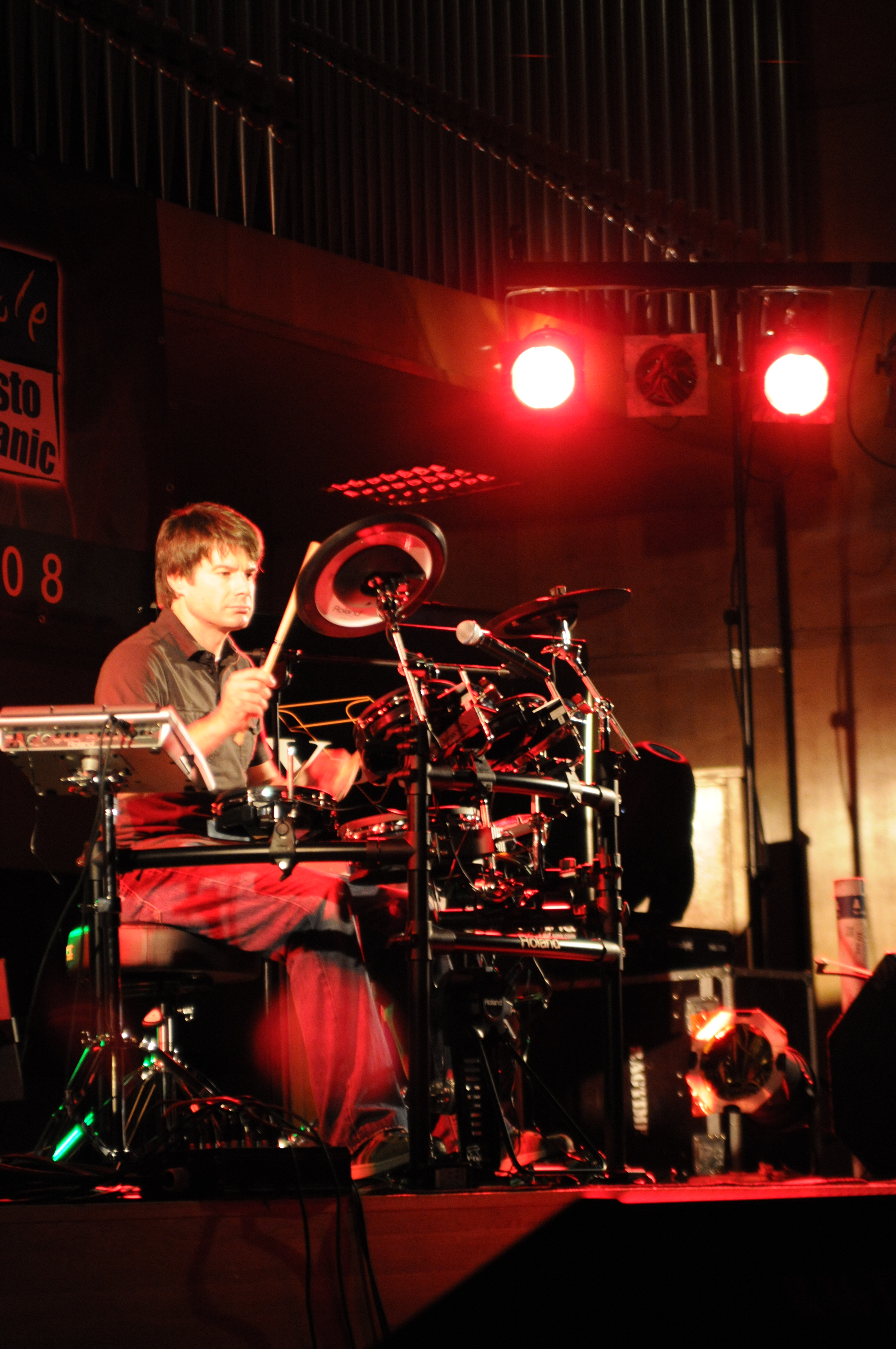 Johnny Rabb